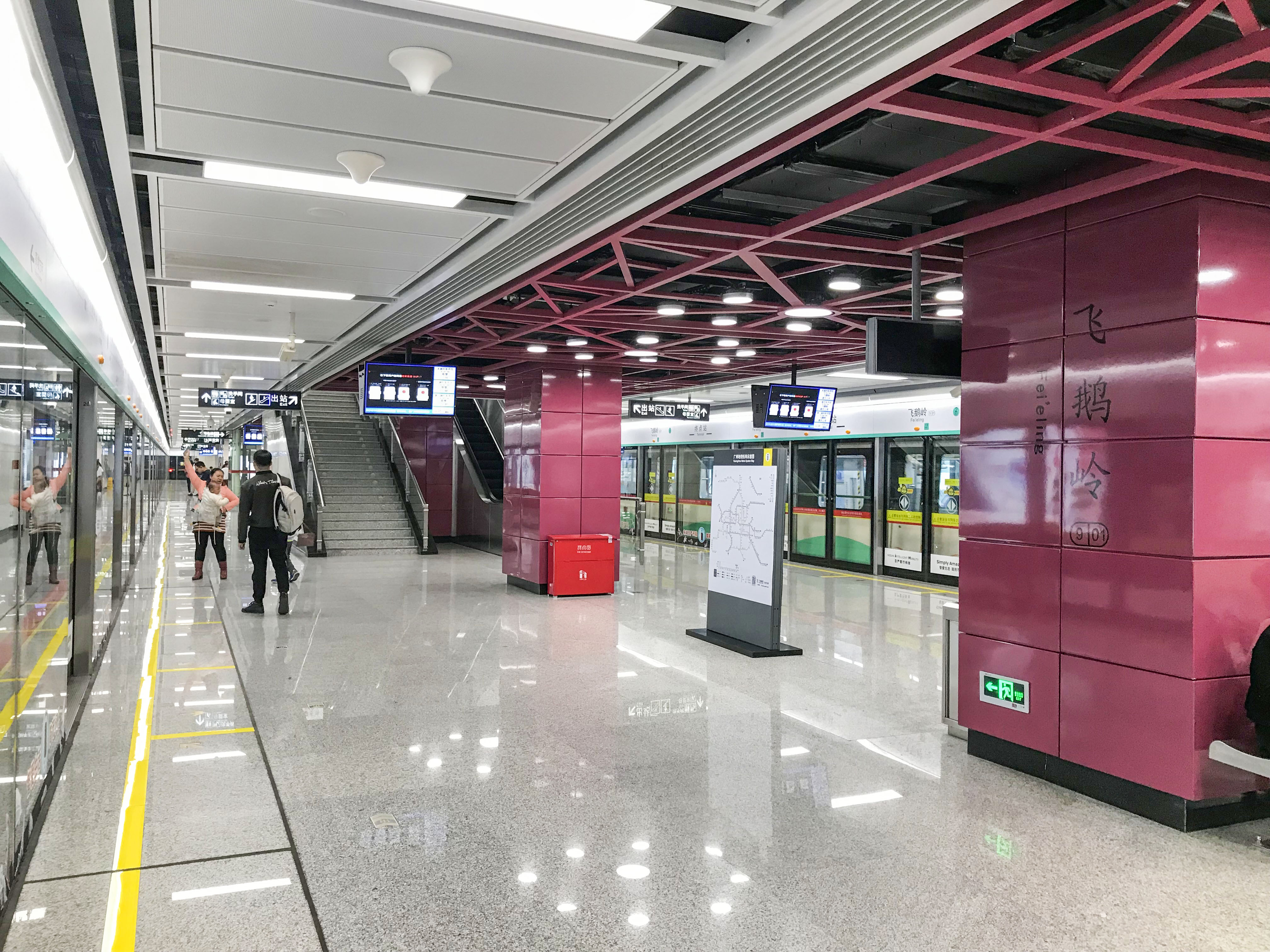 广州地铁飞鹅岭站